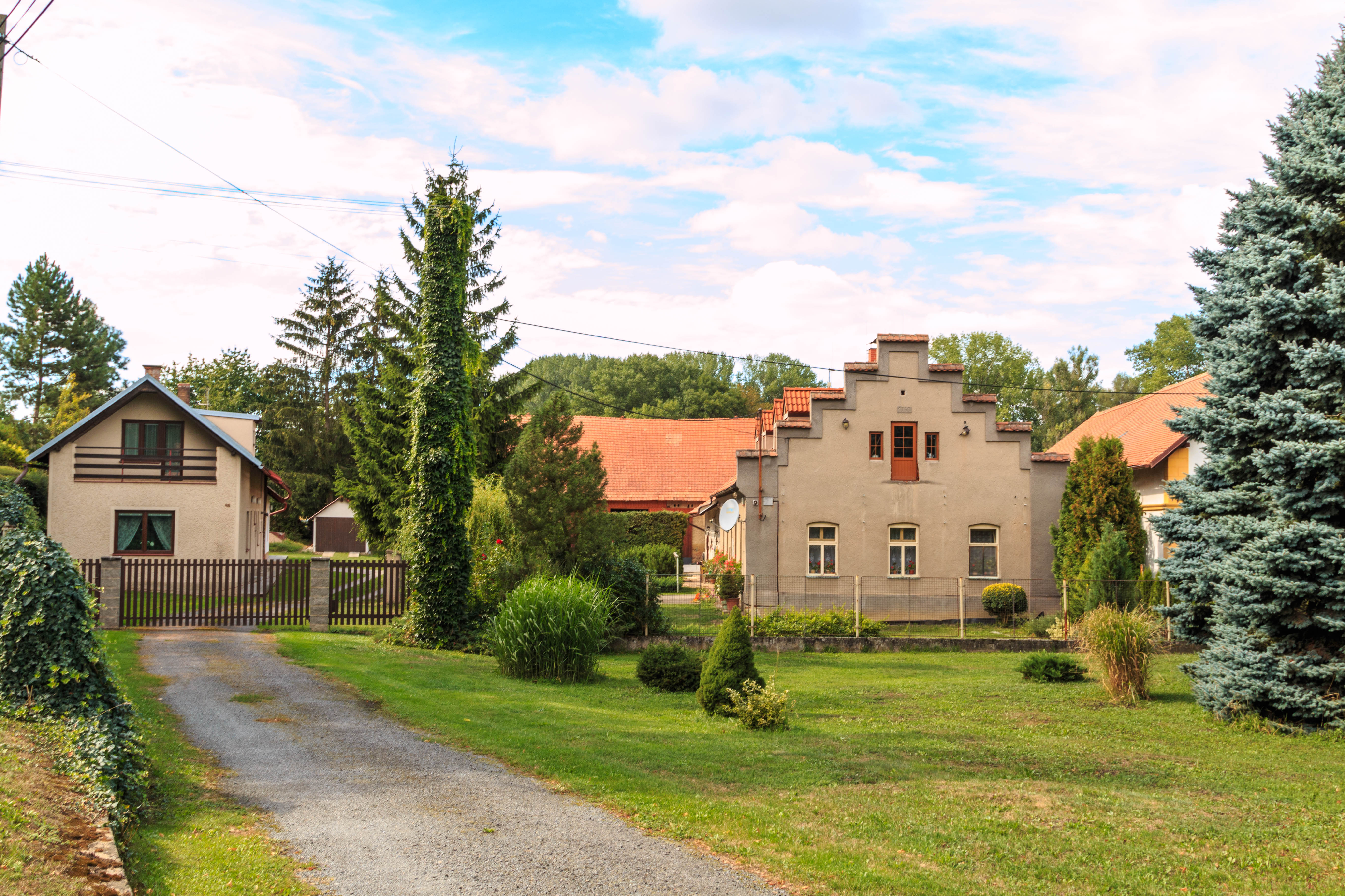 Bližňovice čp. 9